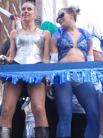 Парад на любовта провел се на 24 септември 2005 г. в Сан Франциско. (авторска снимка)